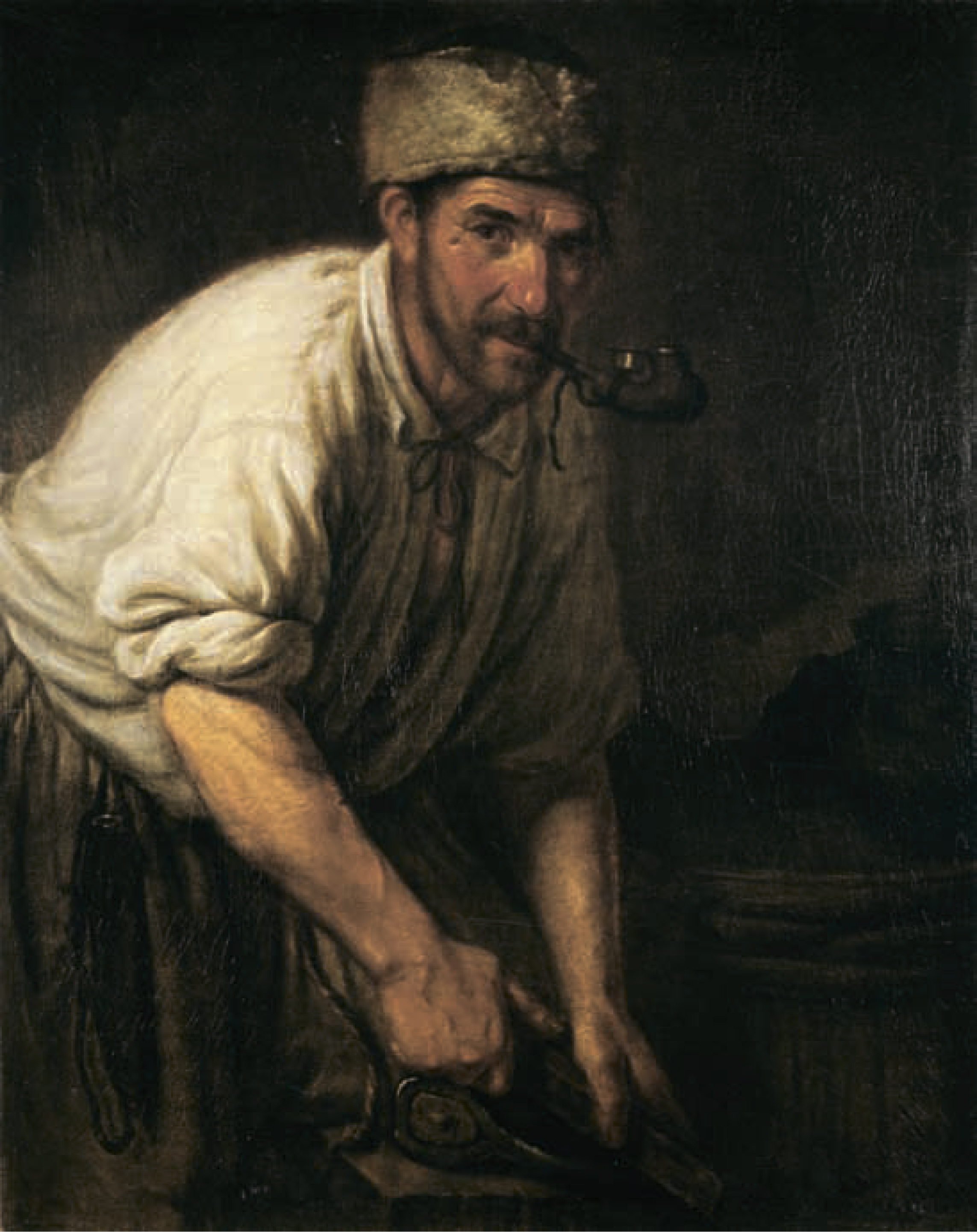 К. С. Павлов Плотник. 1838 Холст, масло. 94,5 х 77 На обороте авторская (?) надпись: 1838 Года съ натуры писалъ Капитонъ Павловъ. Пост. в 1938 через ЛЗК (собрание В. Д. Фролова) Ж-5258 Картину «Плотник» можно отнести к нечасто встре- чающемуся жанру «профессионального портрета». Очевидно, работа была выполнена с натуры: фигура работающего мужчины, загорелое лицо с крупными чертами, манера курить трубку за работой взяты из жизни. Живописец написал «Плотника» в период своей жизни в Малороссии, когда он преподавал ри- сование в Нежинской гимназии, где его учениками были Н. В. Гоголь, А. Н. Мокрицкий, Н. П. Кукольник и другие. В картине отразились впечатления худож- ника от реальной жизни, нелегкого труда, приносяще - го мастеровому человеку истинное удовлетворение.